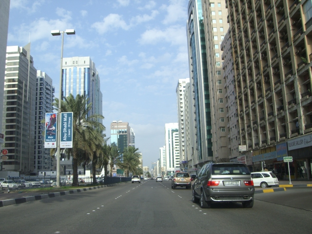 Abu Dhabi